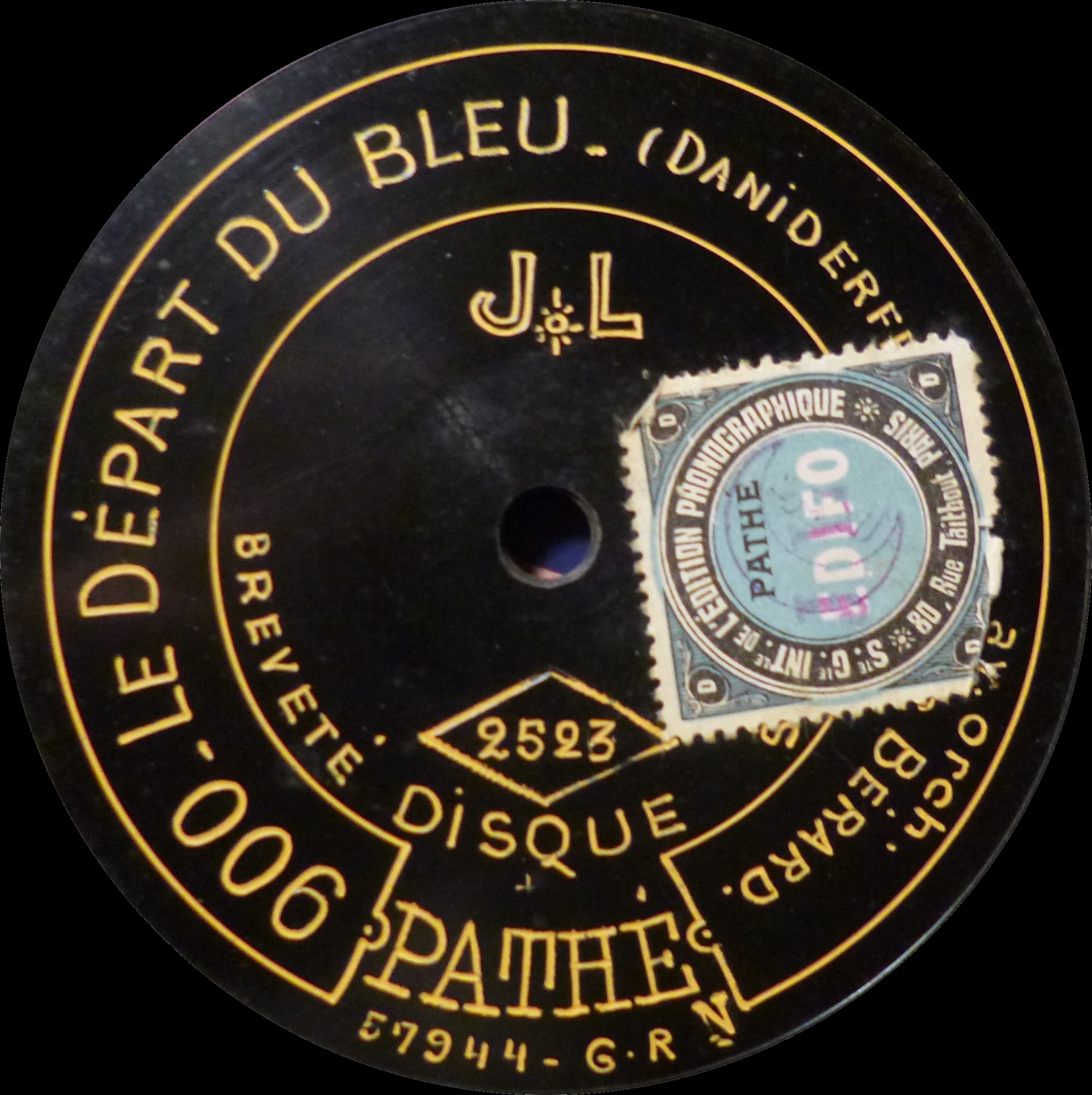 Bérard. Disque 90t Pathé. Circa 1910